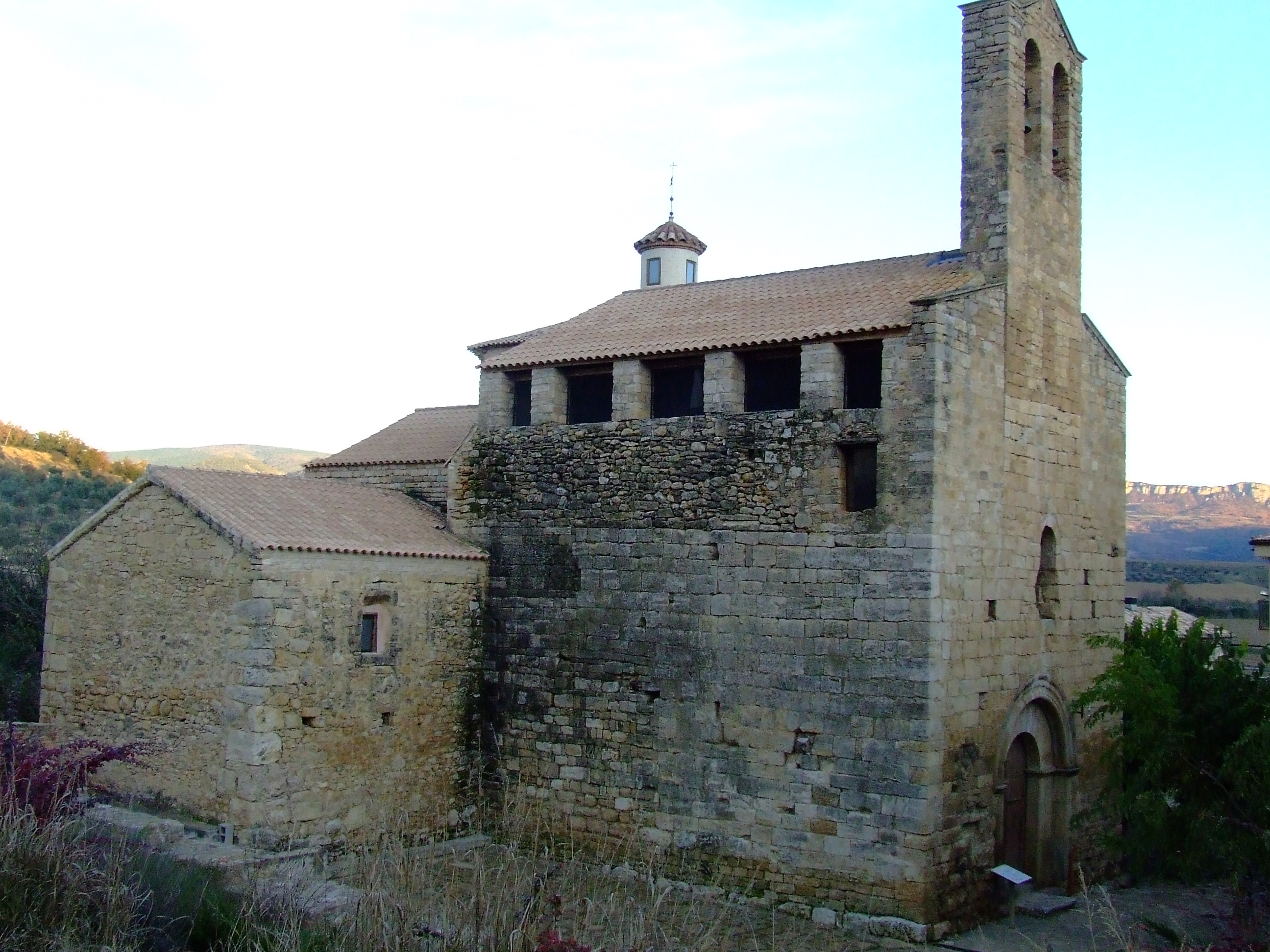 La vila de Conques. Porxos de la plaça (Isona i Conca Dellà)